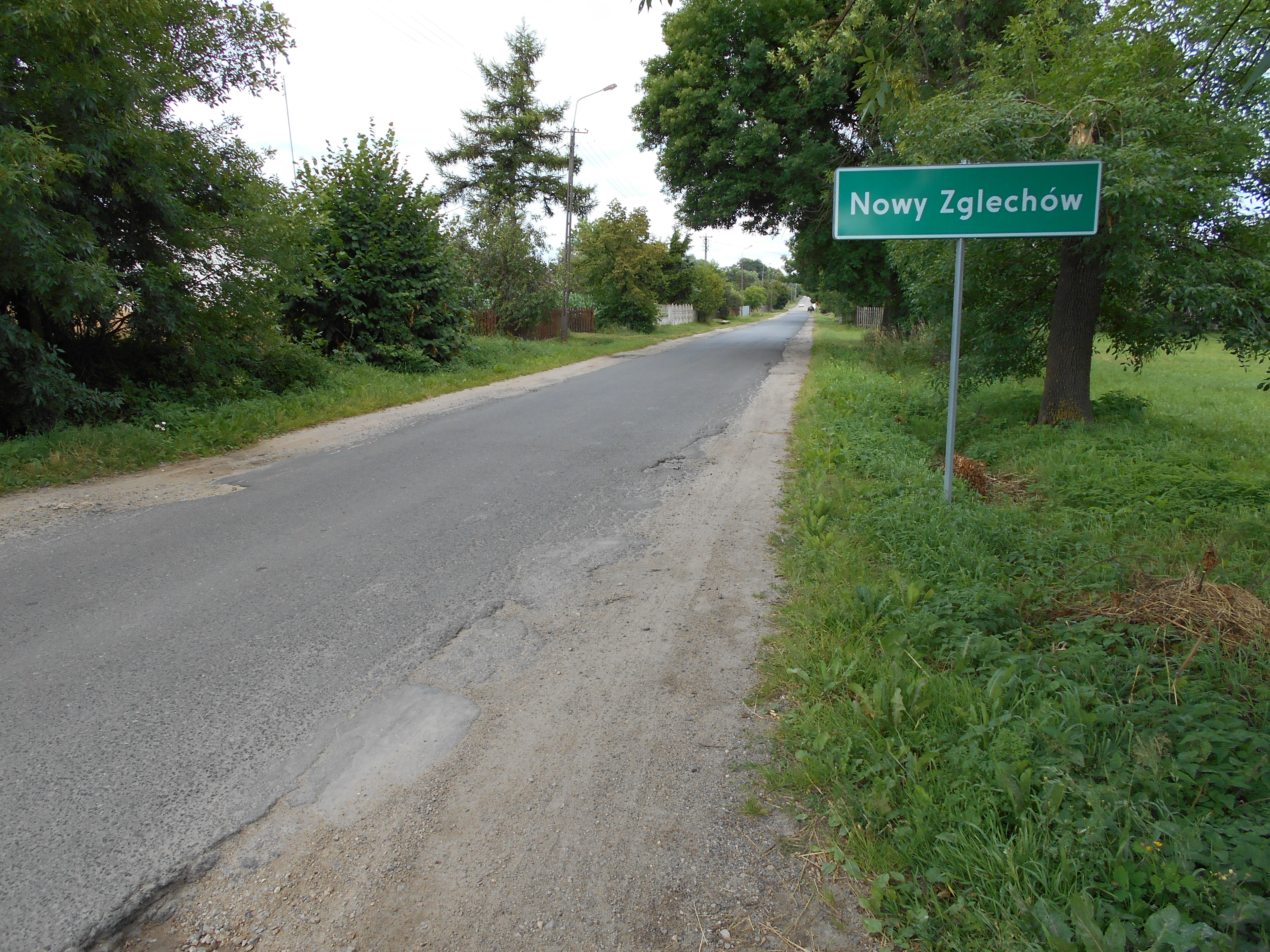 Miejscowość w gminie Siennica